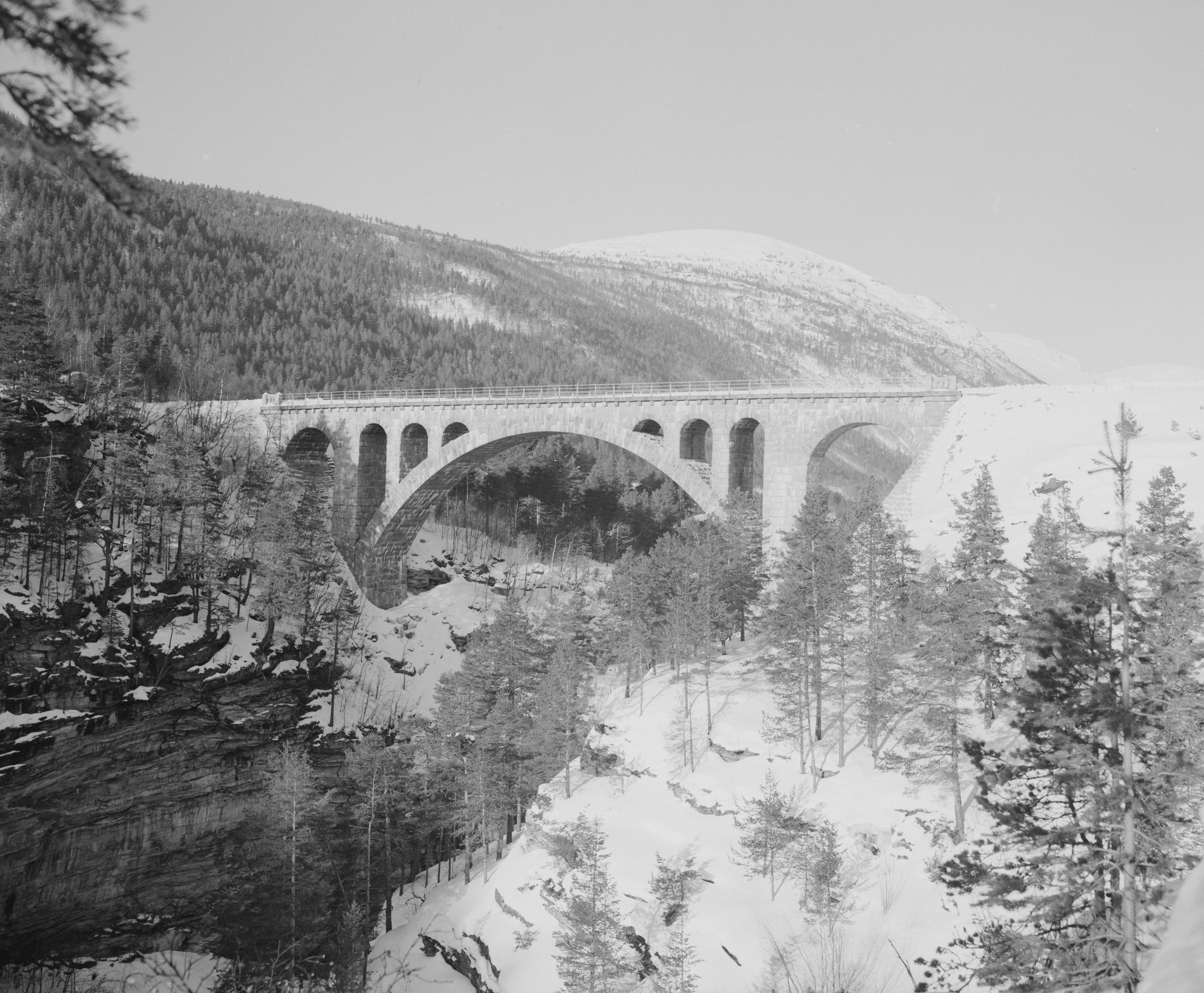 Bildet er hentet fra Nasjonalbibliotekets bildesamling. Anmerkninger til bildet var: Fotograf : G.S Kylling,Romsdalen, Rauma, Møre og Romsdal